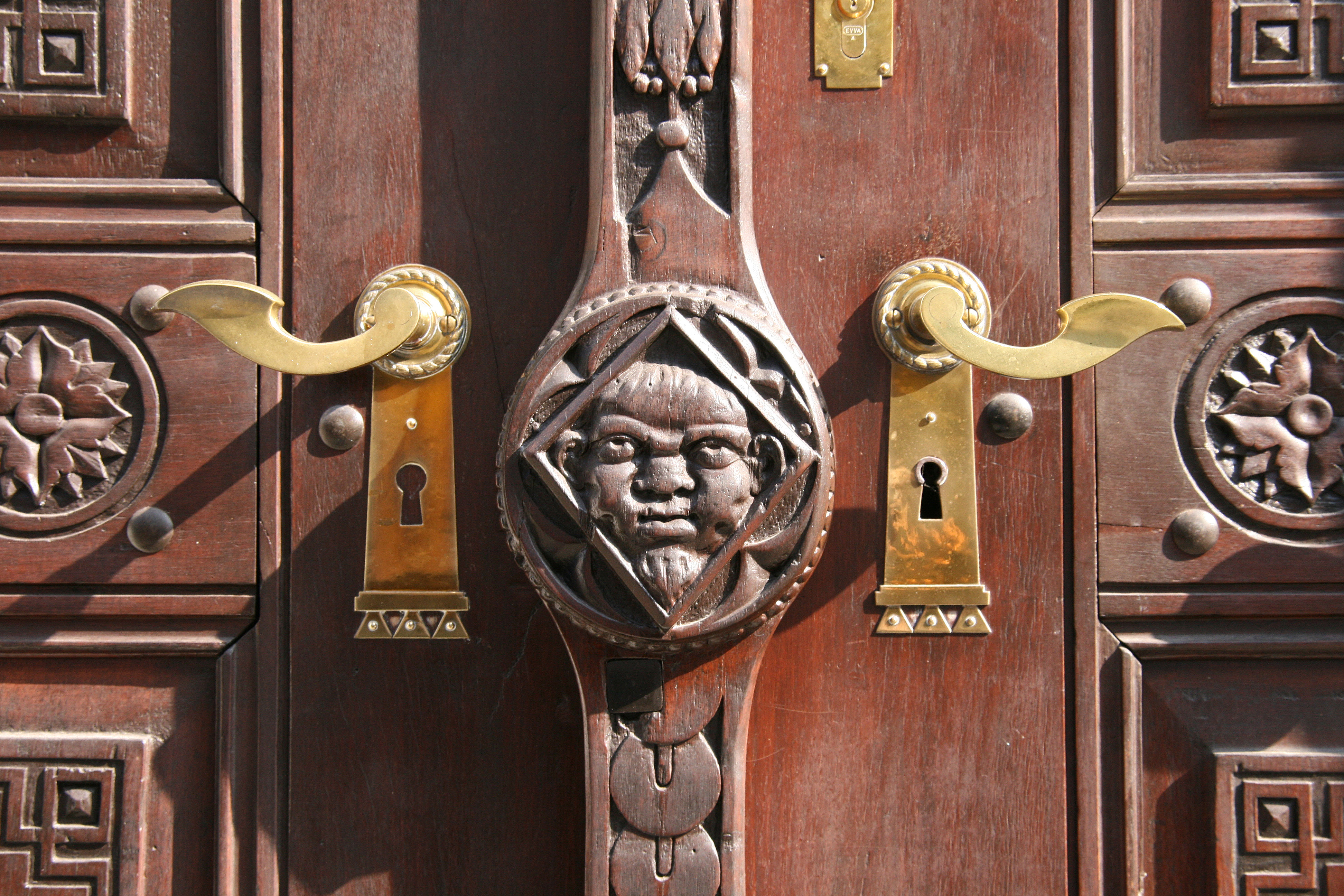 aus dem DEHIO Vorarlberg 1983: Maurachgasse Nr. 17: Um 1800. 2geschossig, Freitreppe zu erhöhtem Hauptgeschoß mit Korbbogenportal ( Keilstein mit Handwerkszeichen der Glaser). *** In Bregenz, Vorarlberg. *** Türschilder